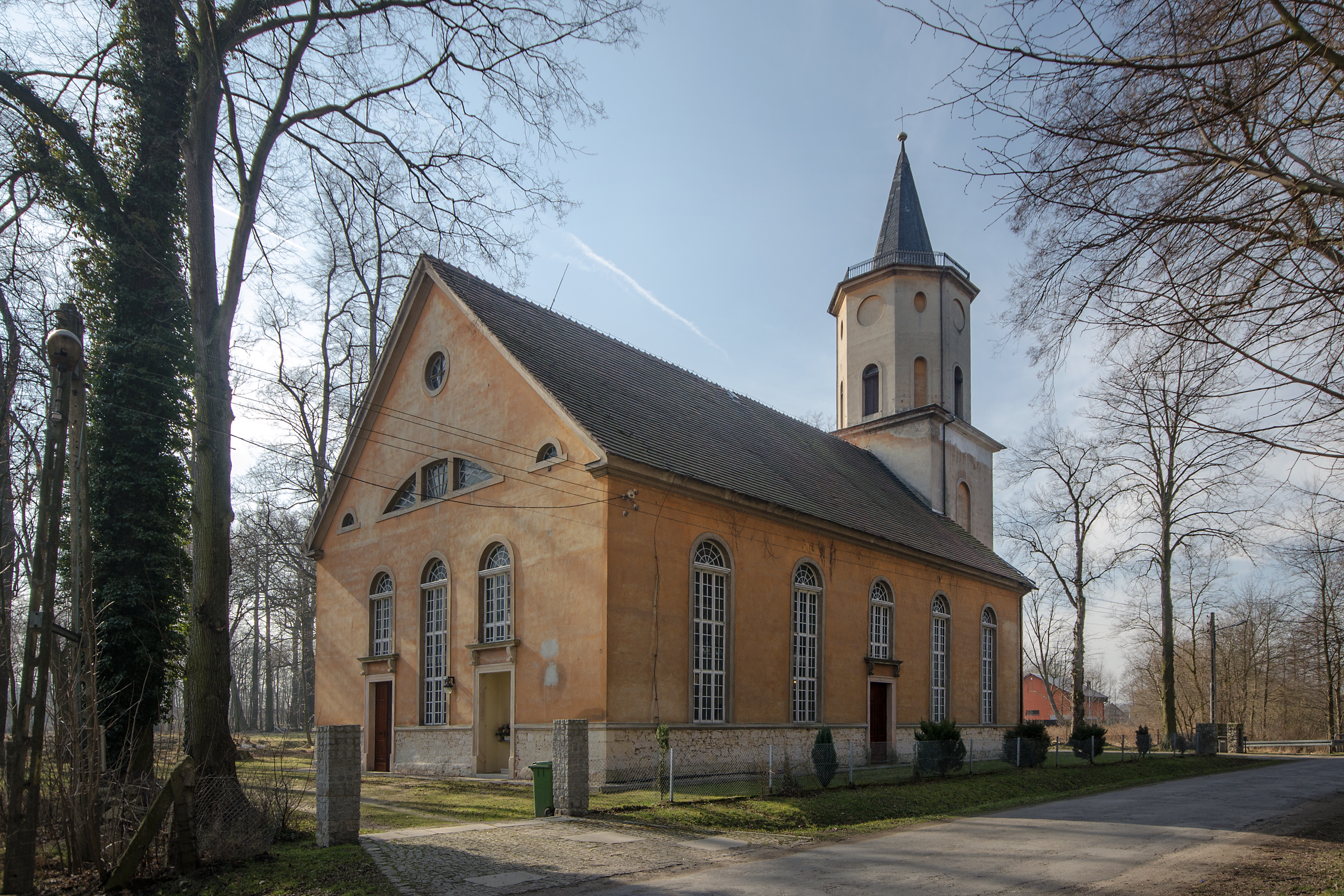 Konradówka, kościół ewangelicki, ob. rzym.-kat. fil. p.w. św. Michała Archanioła, 1829